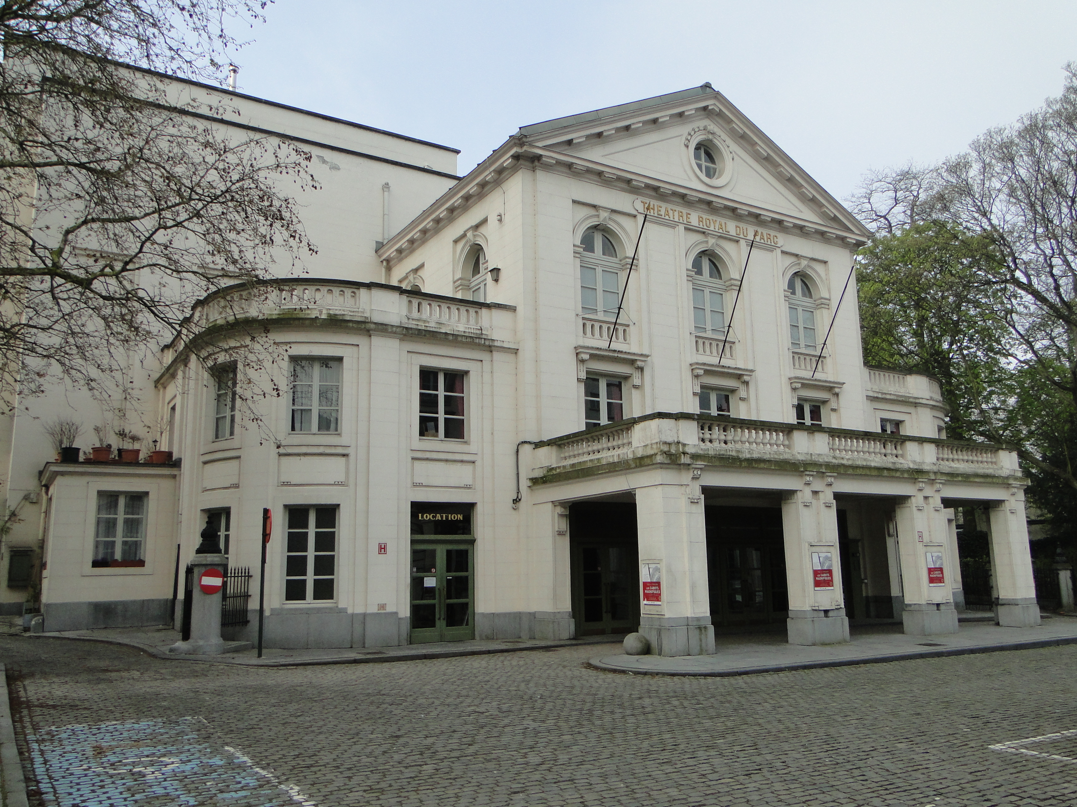 Brussel